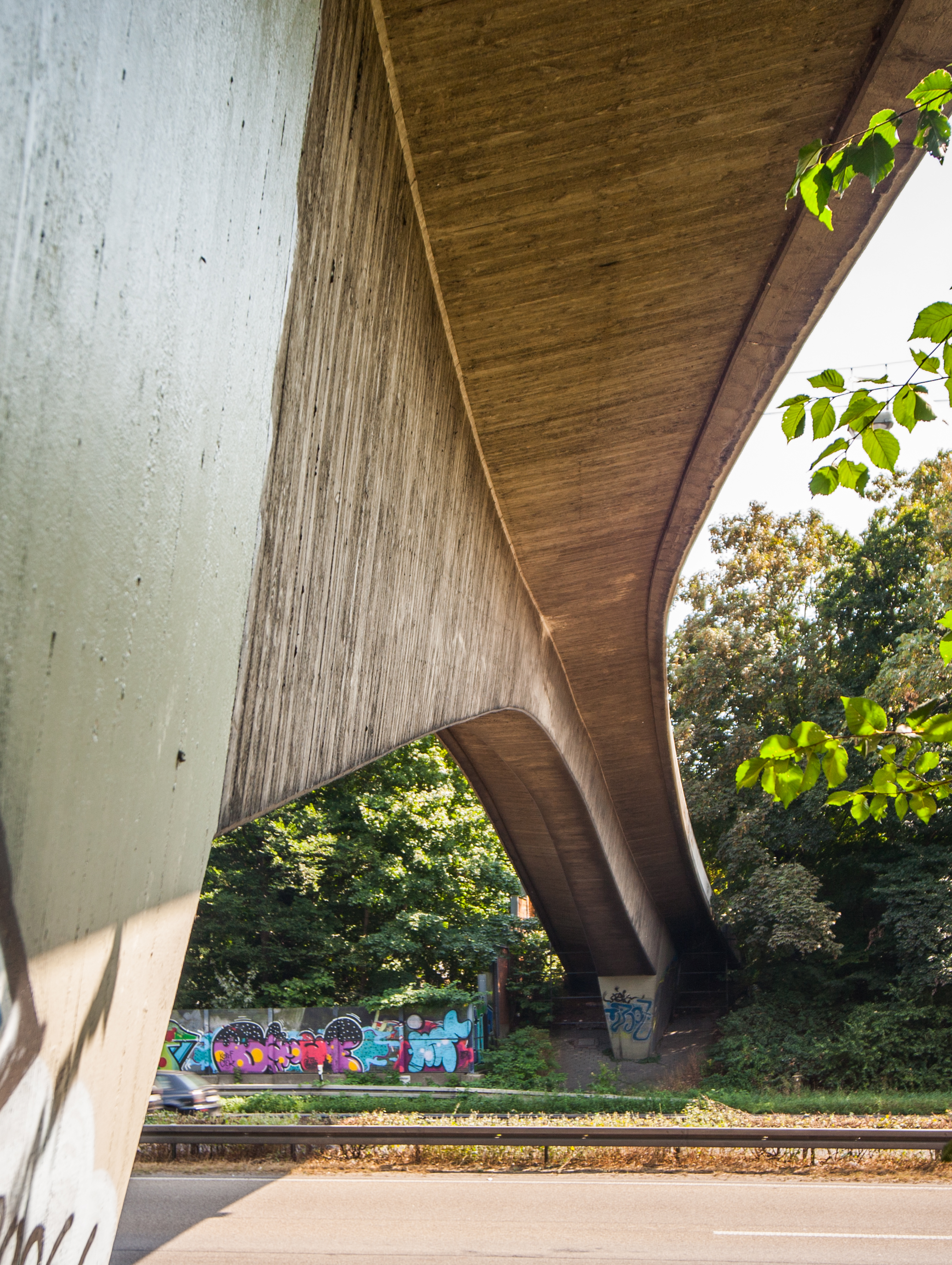 Sportpark Nord, Bonn: Fußgängerbrücke über die Autobahn